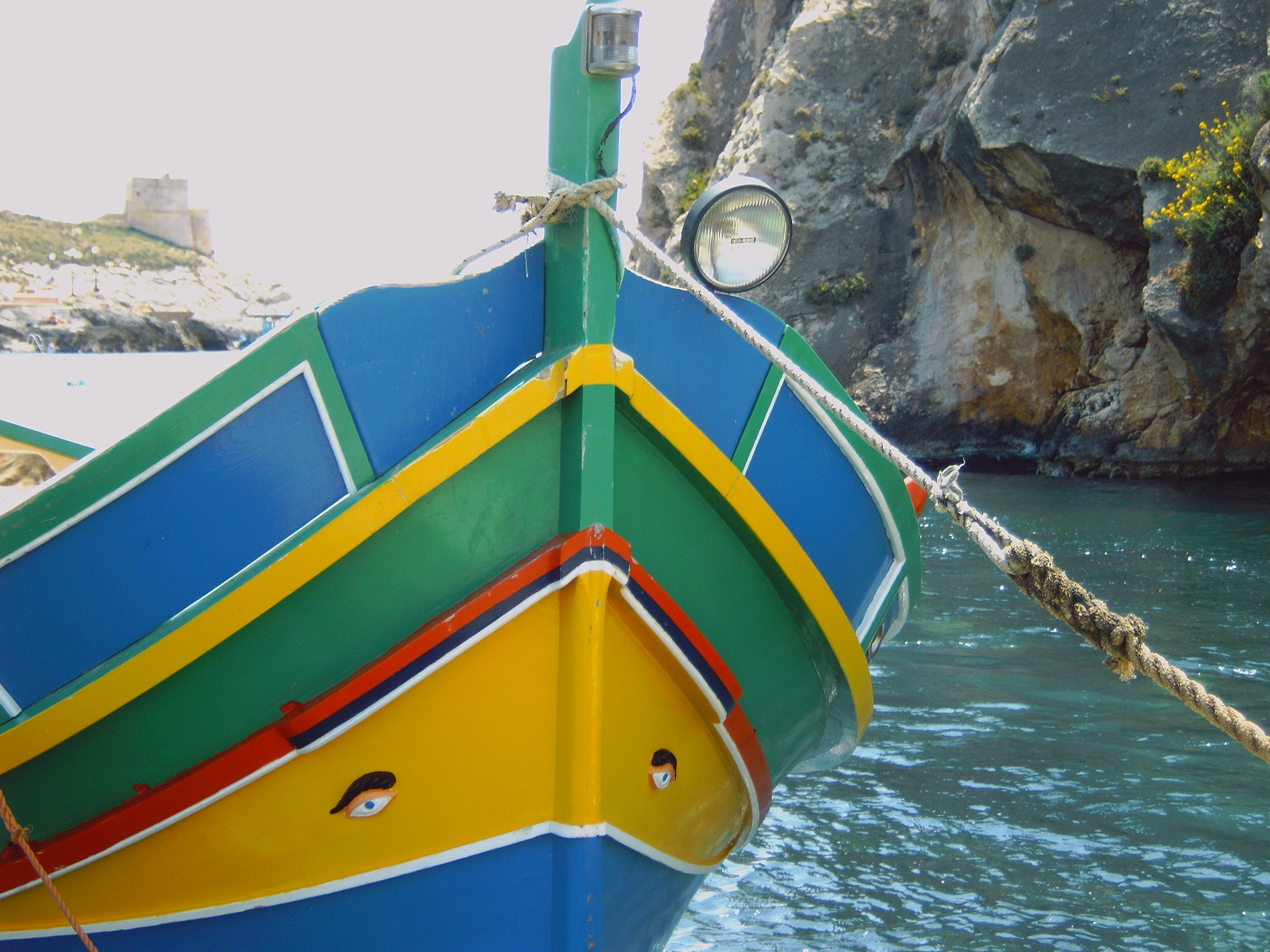 Bateau traditionnel maltais